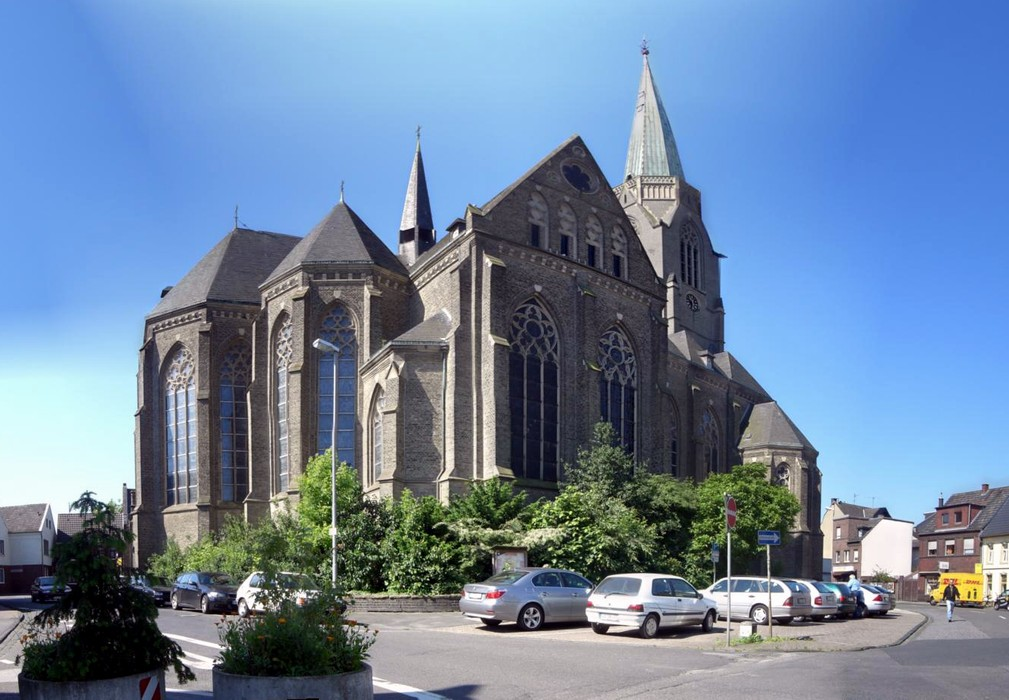 Kirche in Anrath, Deutschland This image shows a heritage building in Germany, located in the North Rhine-Westphalian city Willich (no. 16).